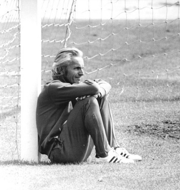 ADN-ZB-Mittelstädt-21.6.74-la-BRD-Hamburg: Fußball-WM 74- Cheftrainer Georg Buschner beobachtet das Training seiner Schützlinge. Ob die Trainingsleistungen noch Einfluss auf die Nominierung für das wichtige Spiel am Sonnabend gegen die BRD haben? (beachte dazu bitte auch N0621-29N)